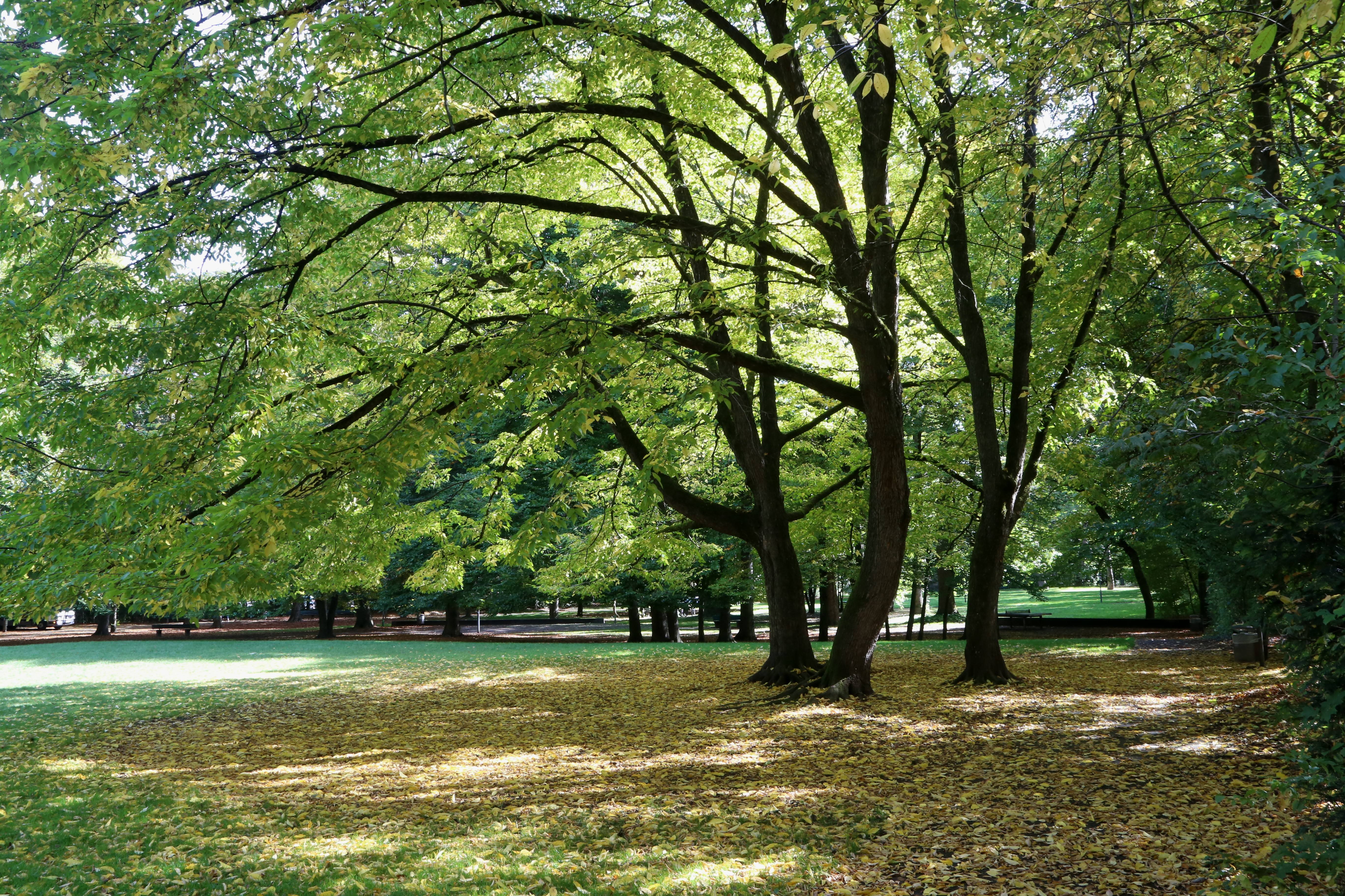 Grünwaldpark, München, liegt im Landschaftsschutzgebiet „Nymphenburg“, LSG 00588.01